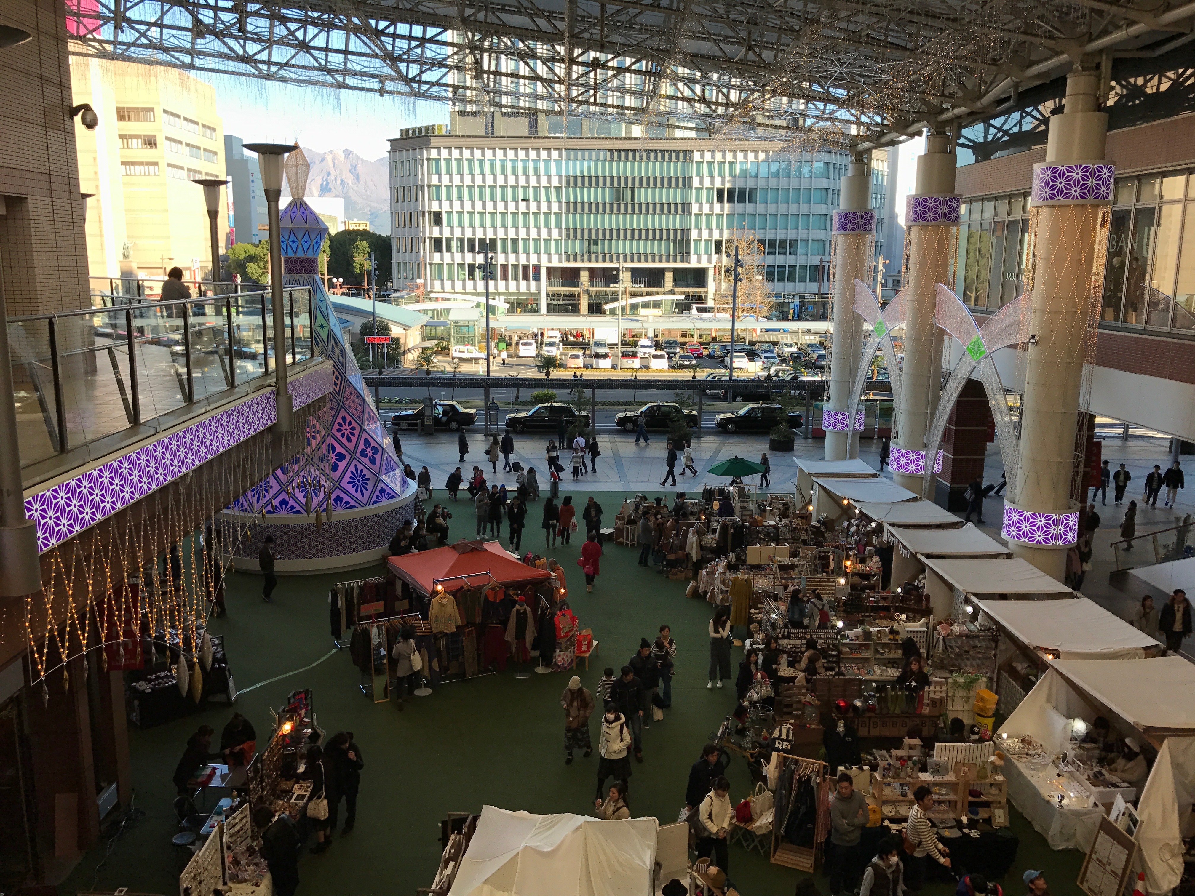 アミュ広場